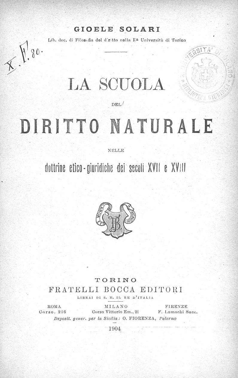 Frontespizio